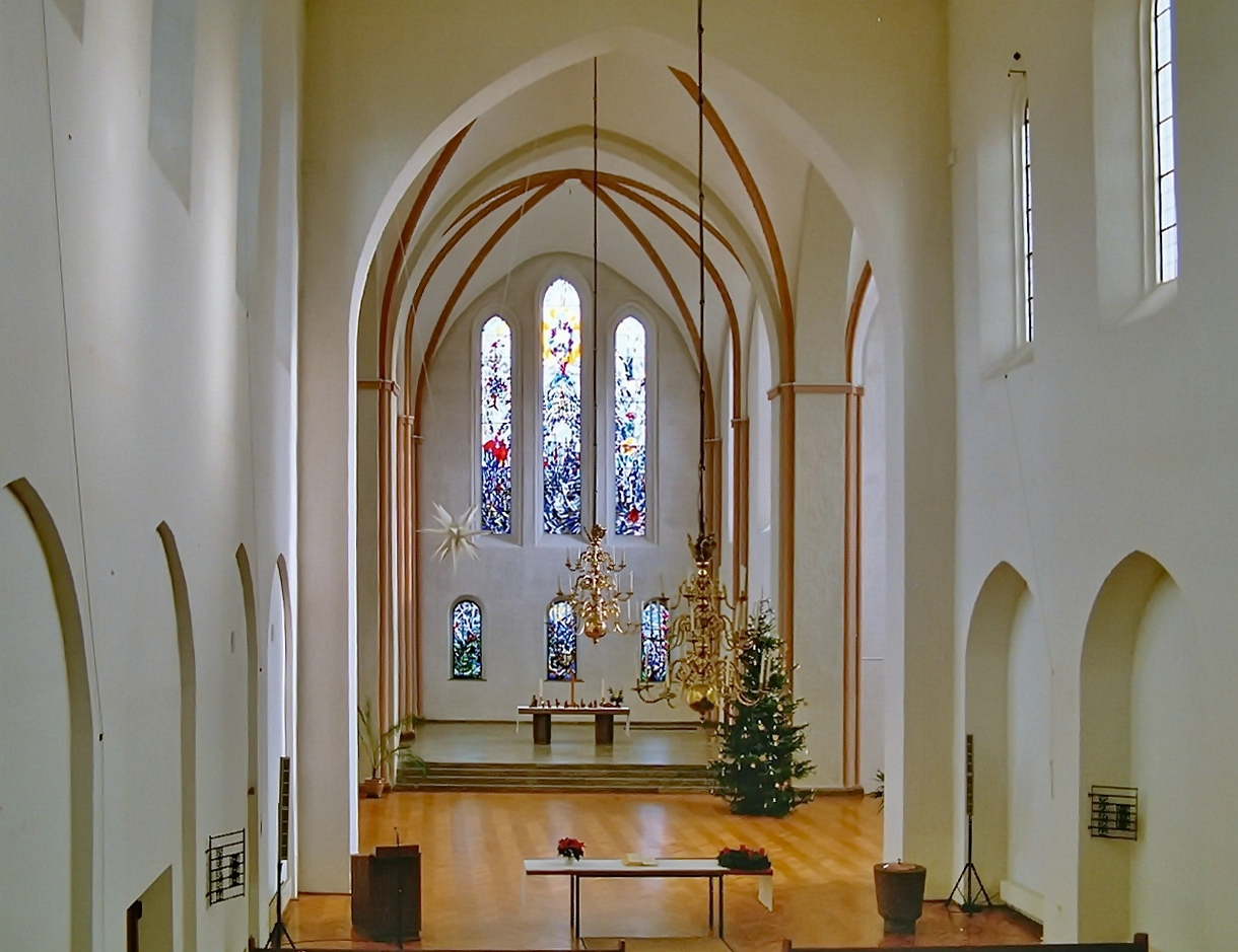 Stephanikirche Bremen, Chor mit Glasfenstern von Erhart Mitzlaff (1967), Krippenfiguren auf dem Hauptaltar